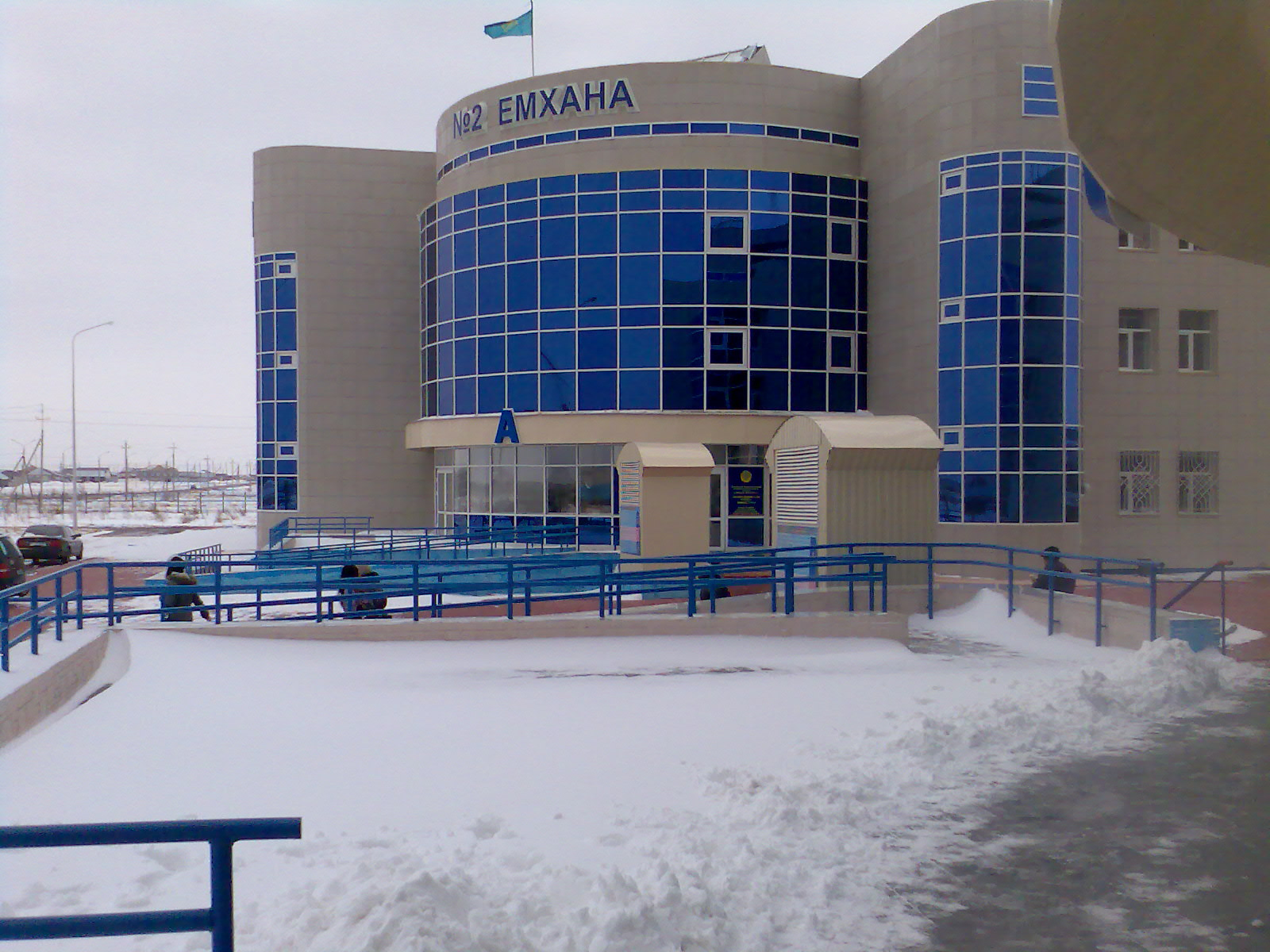 Поликлиника № 2 в городе Экибастузе